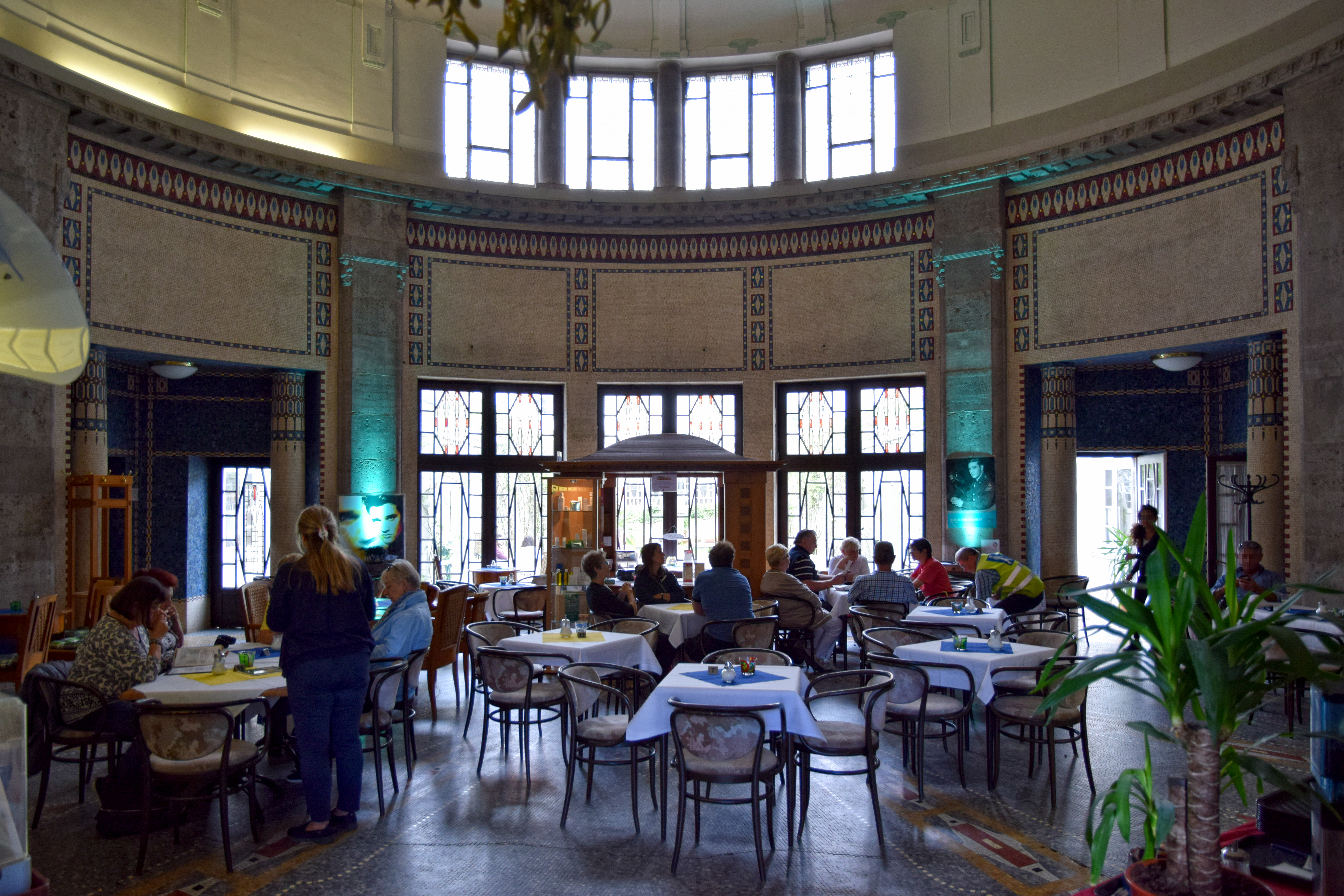 Ein Innenraum im Sprudelhof, Bad Nauheim